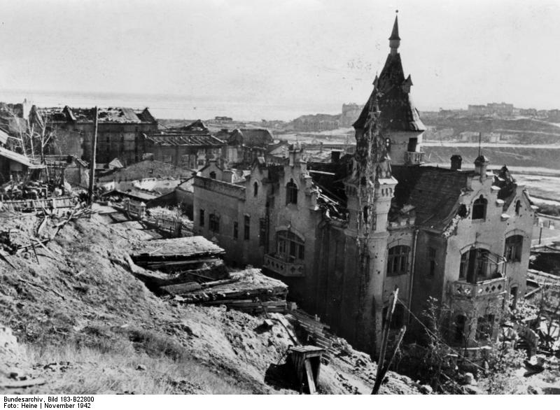 Russland, Kampf um Stalingrad, Zerstörungen Scherl: "Die deutsche Burg" in Zarizatal Dies war das einzige Haus Stalingrads, das die deutschen Soldaten heimatlich anmutete. Es wurde genannt "die deutsche Burg im Zarizatal". Der Bewohner soll ein Fabrikbesitzer deutscher Herkunft gewesen sein. PK-Aufnahme: Kriegsberichter Heine (Sch) 26.11.42 [Herausgabedatum] (6568) ADN-Bildarchiv II. Weltkrieg 1939-45 An der Front in der Sowjetunion; November 1942 Stalingrad ist nach deutschen Luftangriffen und den schweren Kämpfen zerstört. "Die deutsche Burg" im Zarizatal soll früher einem deutschen Fabrikbesitzer gehört haben. Aufnahme: Heine 6568-42 [Sowjetunion.- Schlacht um Stalingrad] Information added by Wikimedia users.